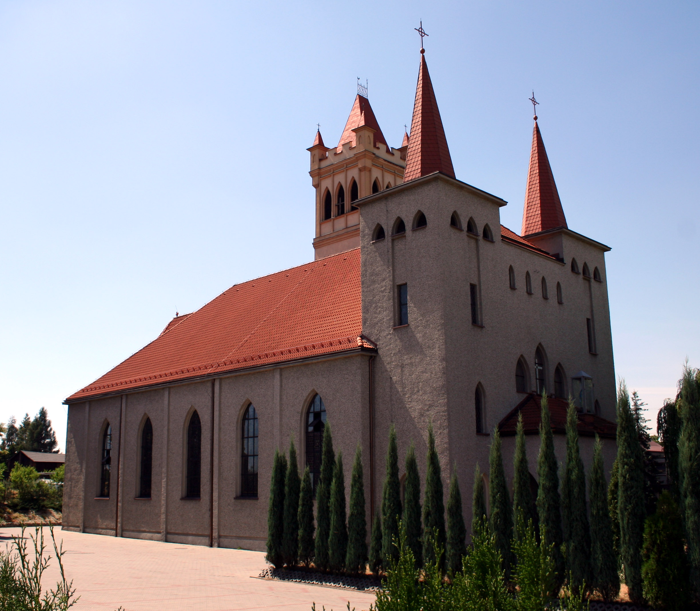 Kościół pw. Matki Boskiej Szkaplerznej i św. Piusa X w Rybniku-Zebrzydowicach.